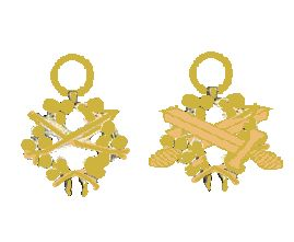 Verhogingen in twee typen